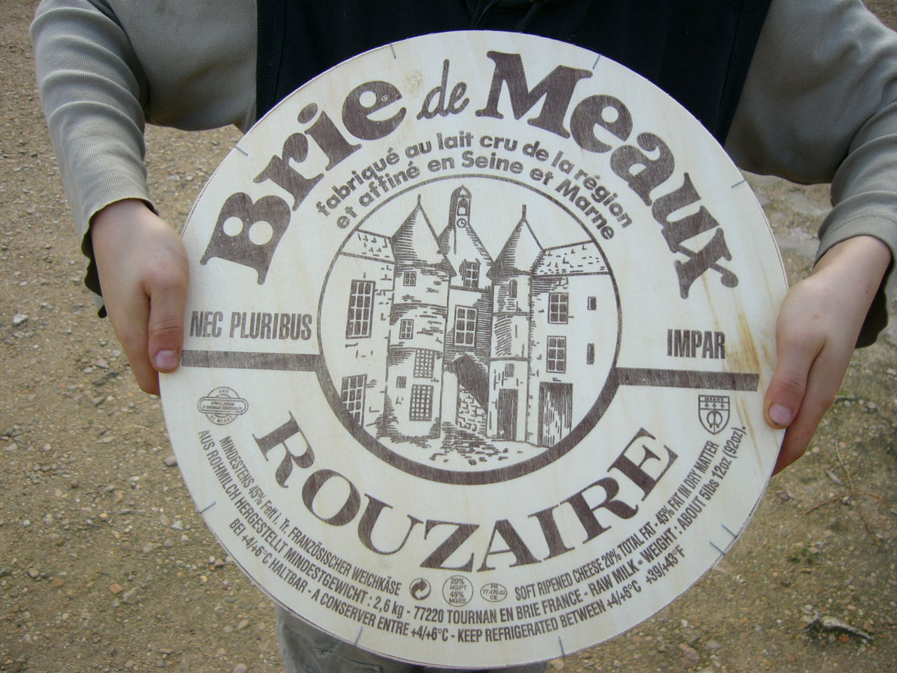 Brie de Meaux cheese